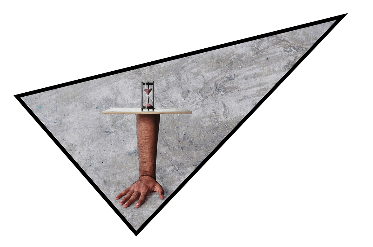 تابلوی زمان،اثر حمیدرضا پیمان،فتومونتاژ،1392